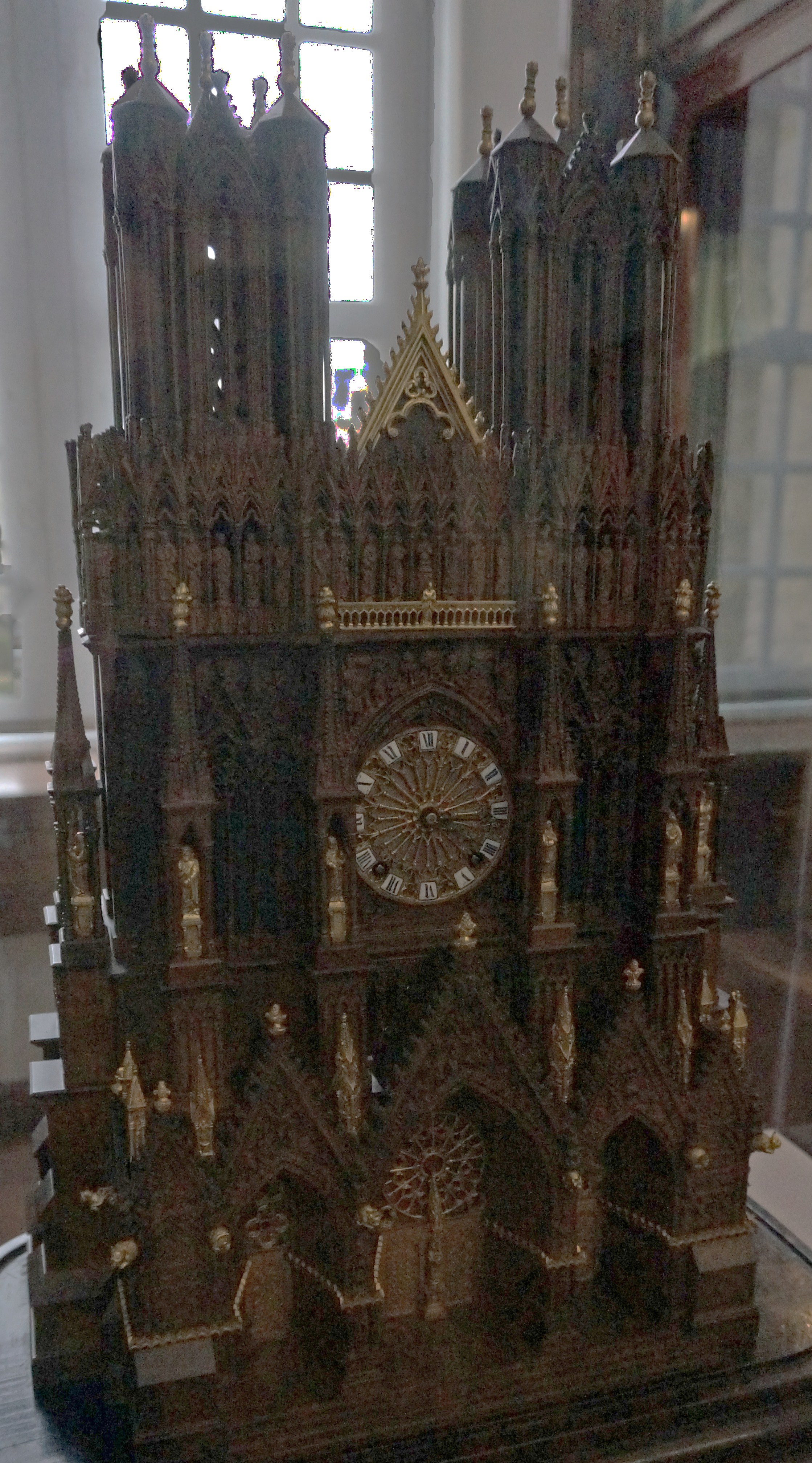 pendule de style à la cathédrale représentant la cathédrale de Reims.